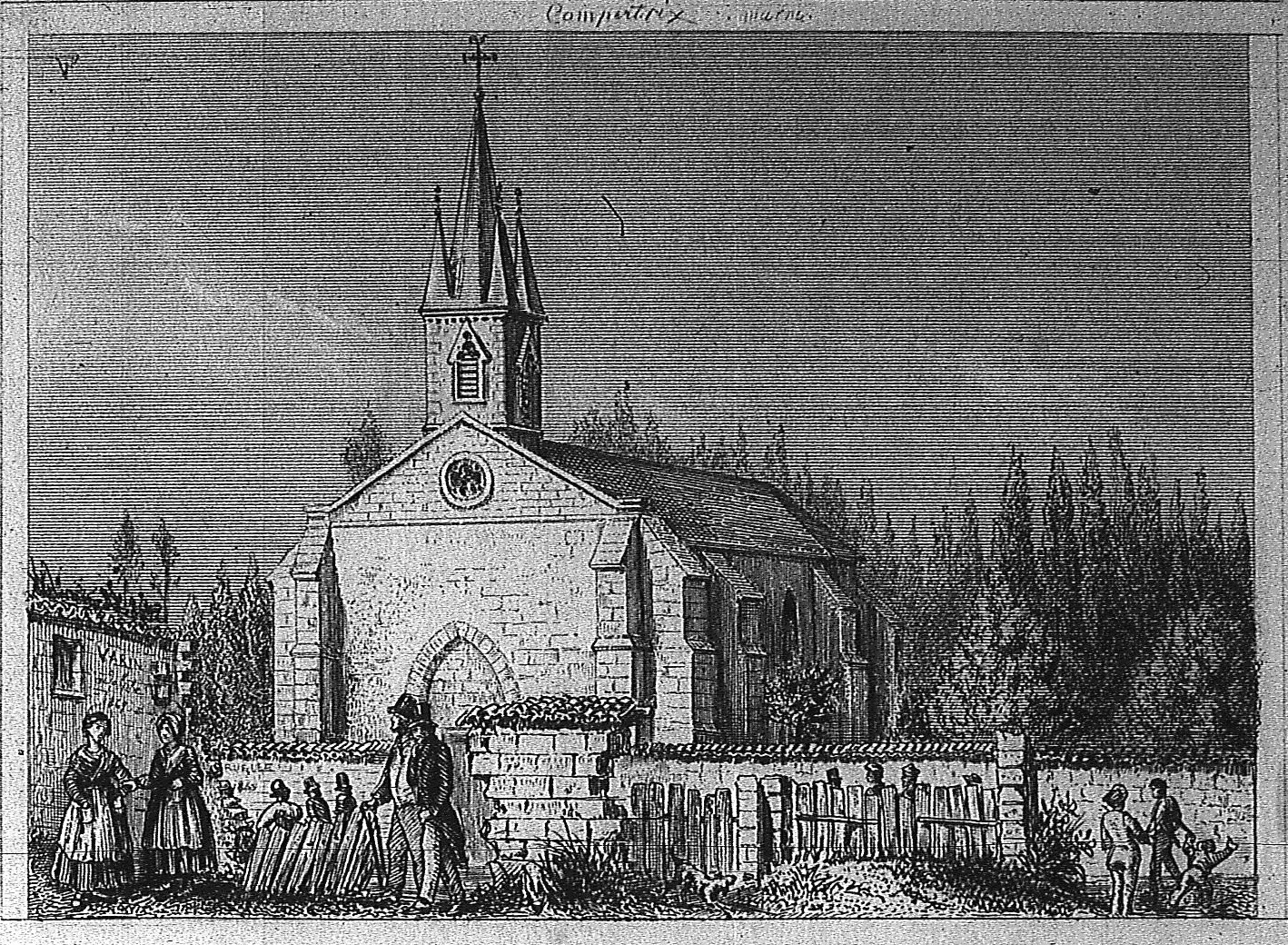 une vue de l'église de compertrix par Adolphe Varin, graveur, en 1869 Description physique: 65 x 91 mm.